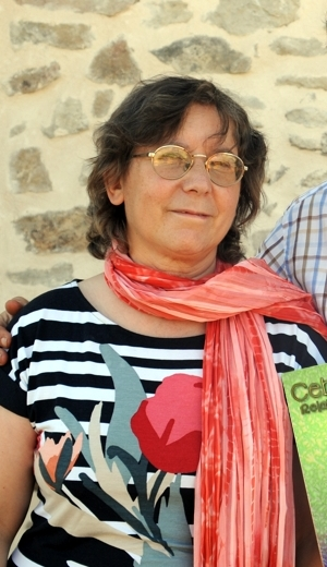 Miguel y Elisa Herrero Uceda, autores del libro Ceborrincho, relatos extremeños